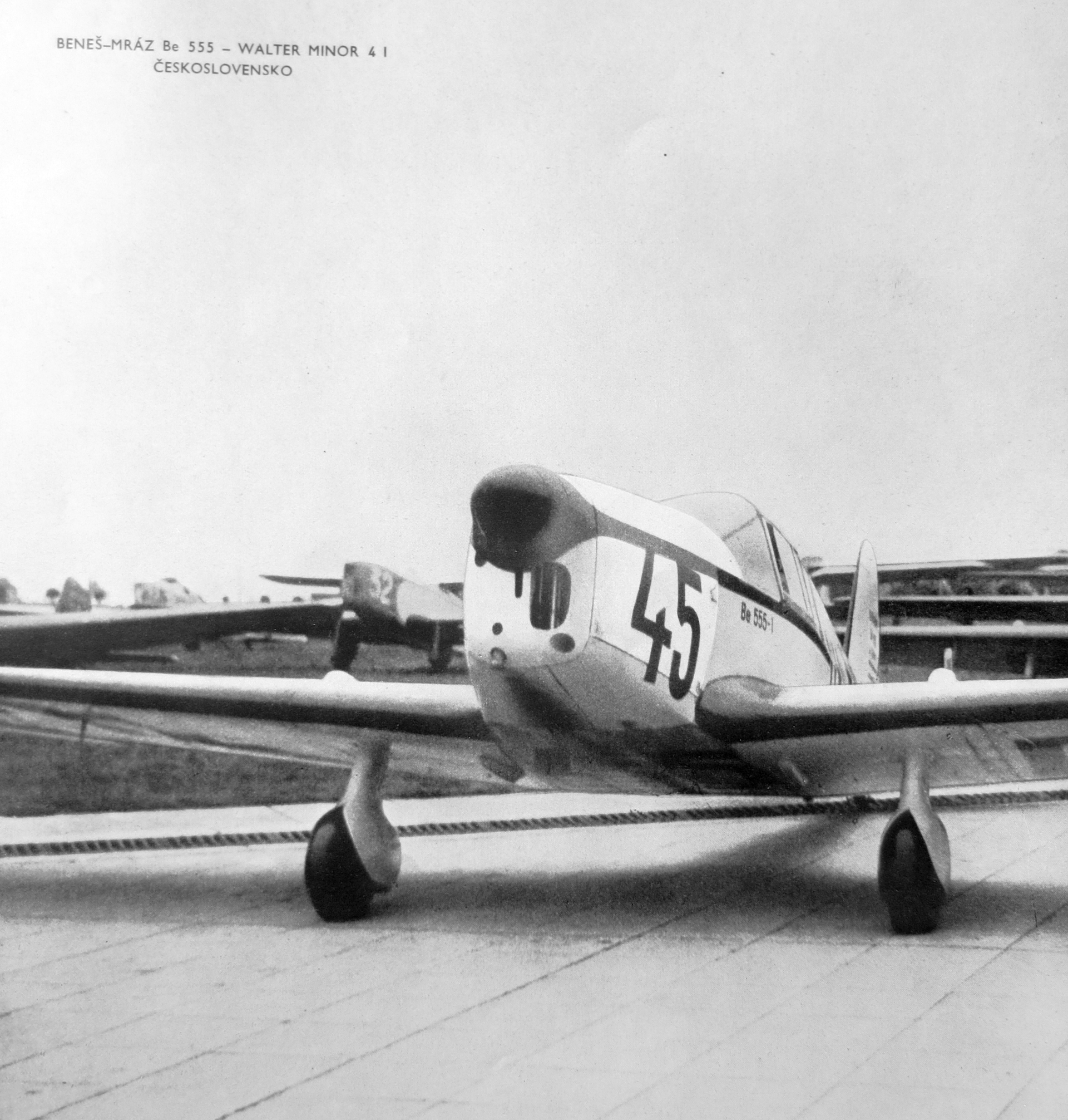 Beneš-Mráz Be-555 Super Bibi a Walter Minor 4 (OK-BEX) na soutěži turistických letadel Kolem Malé dohody v září 1938